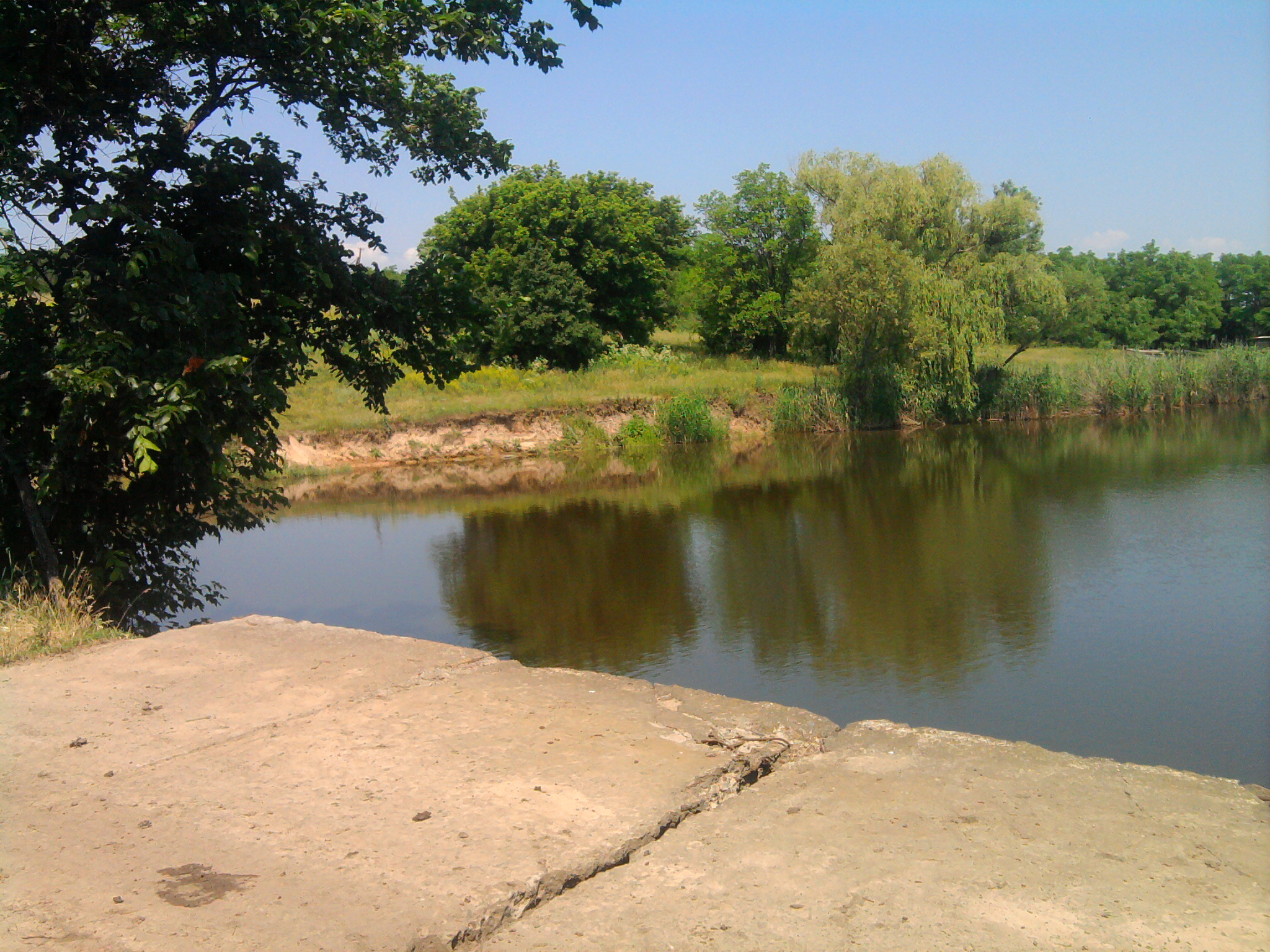 Берег озера